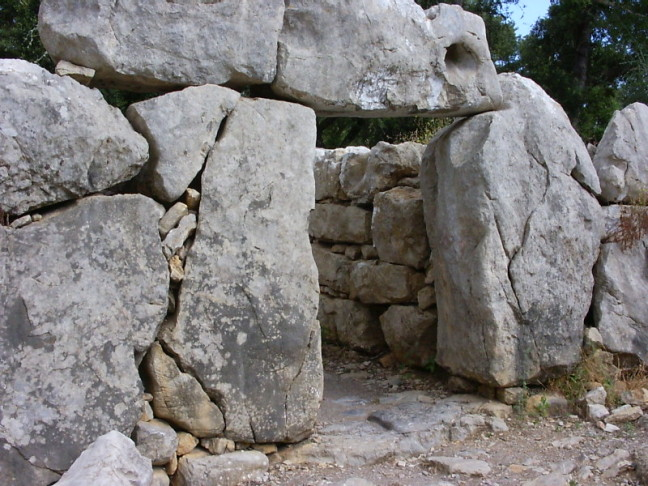 eigene Aufnahmen (Talayot)